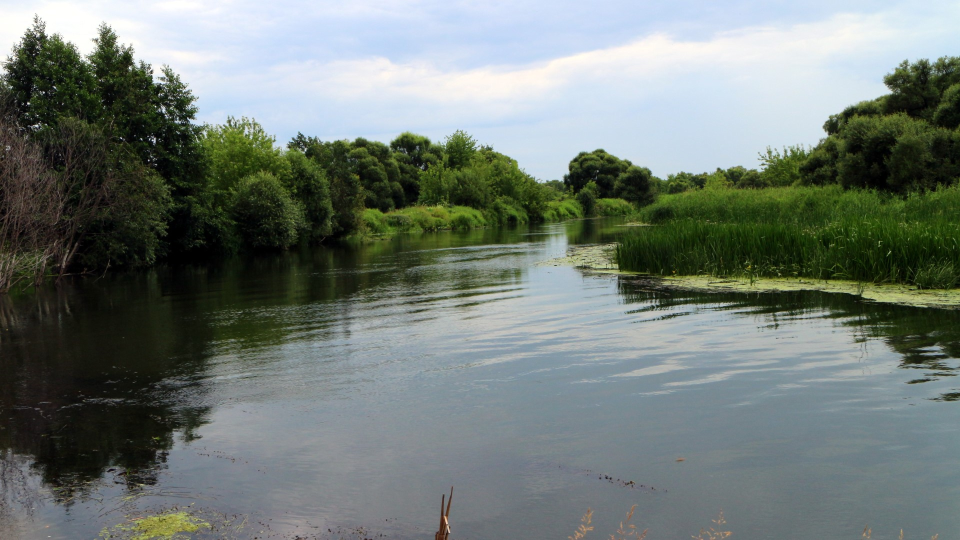 Кирсановский р-н, река Ворона (приток Хопра) у села Калаис. 2018г.